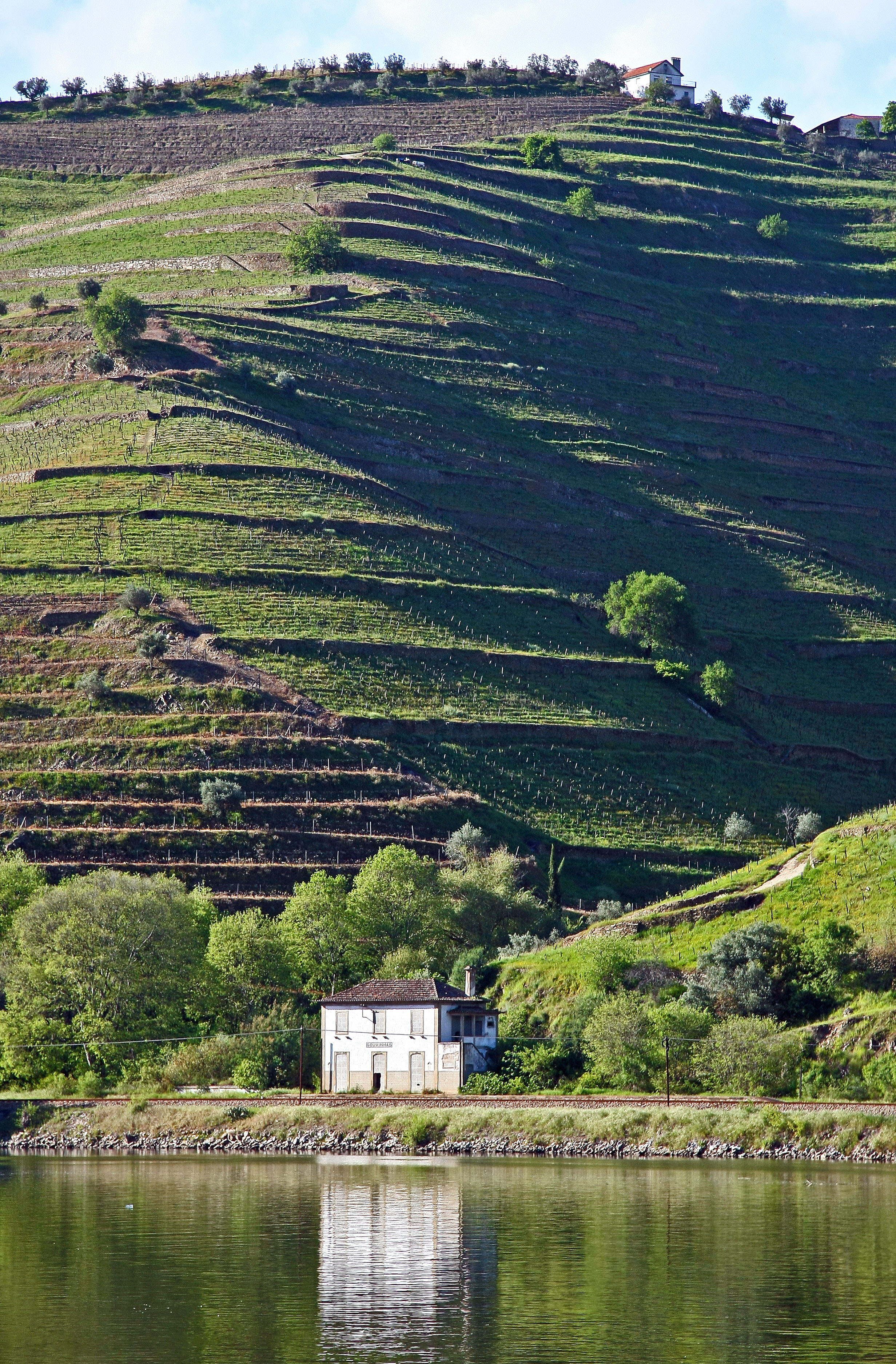 Estação Ferroviária de Gouvinhas - Portugal